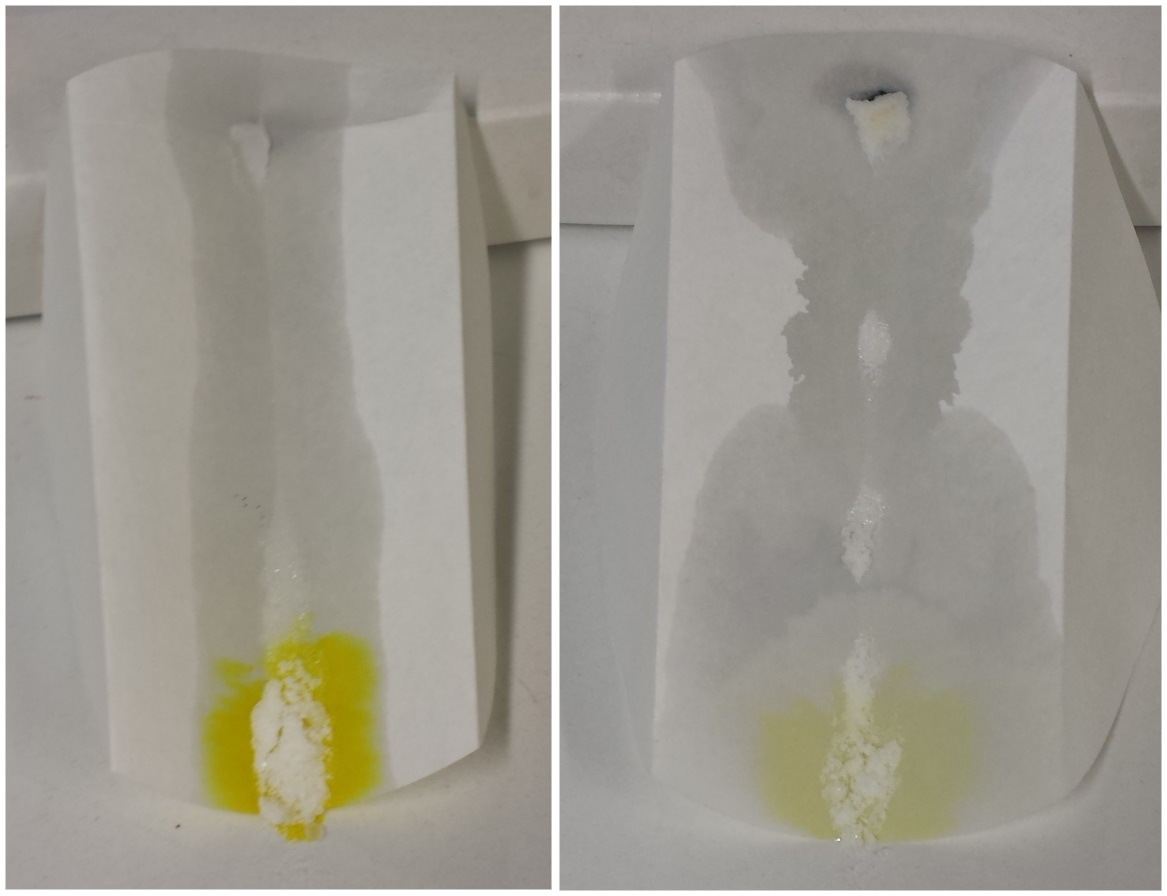 Die "Bismutrutsche". Links eine Blindprobe mit BiCl3, rechts eine Analysesubstanz.